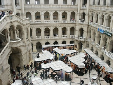 12 Targi Pracy BEST, Gmach Główny Politechniki Warszawskiej